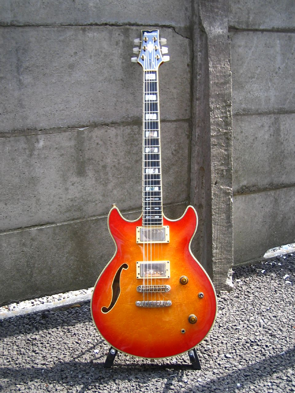 Ibanez AM400